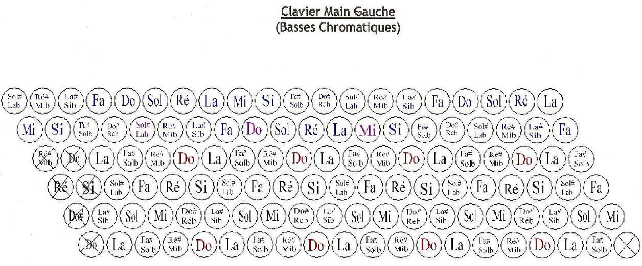 Reproduction du clavier de la main gauche (basses chromatiques) d'un bayan. Deux rangées de basses pédales(en haut en bleu), et quatre rangées de basses chromatiques (en bas en noir)